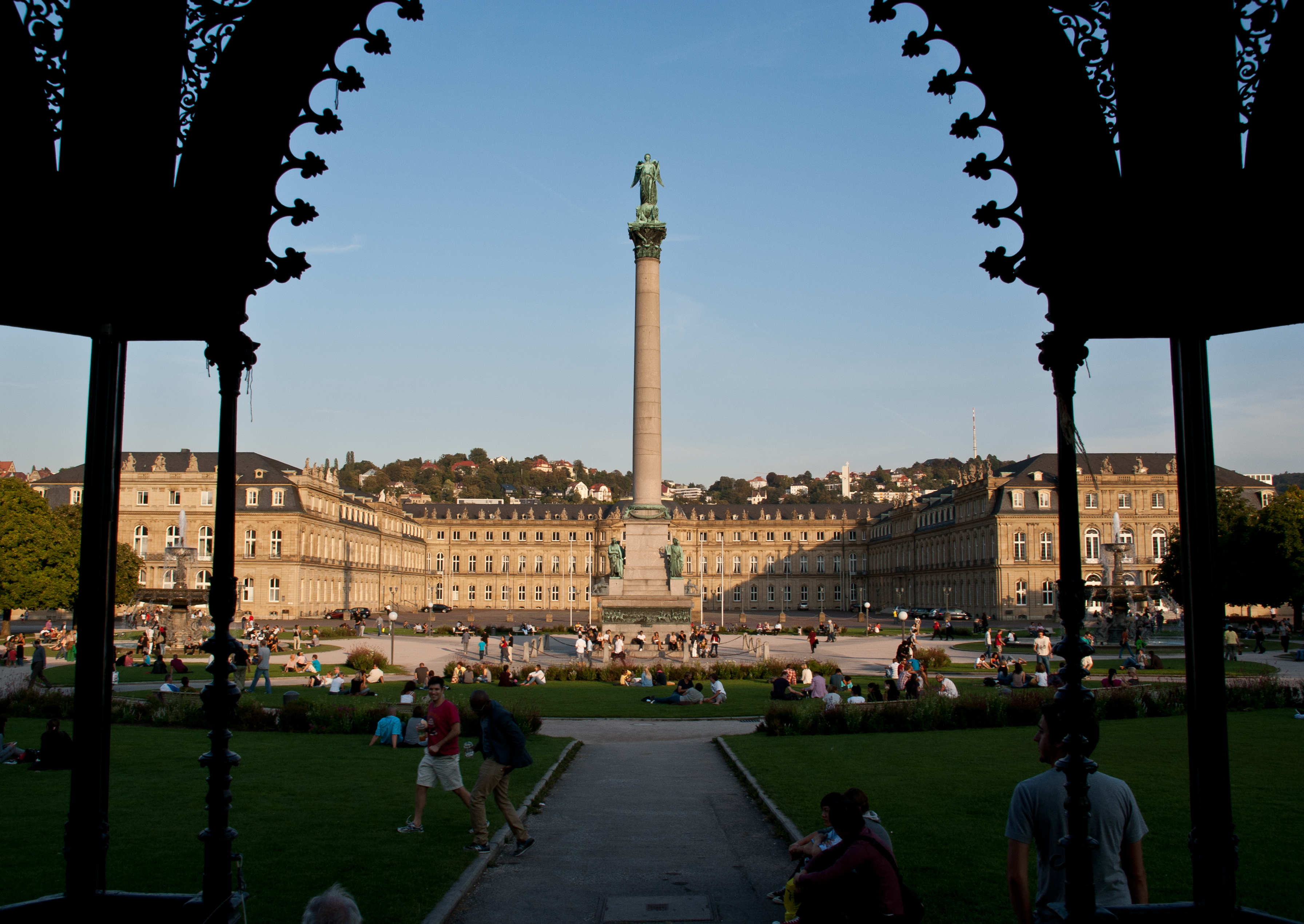 Neues Schloss in Stuttgart, Perspektive vom Musikpavillon auf dem Schloßplatz.